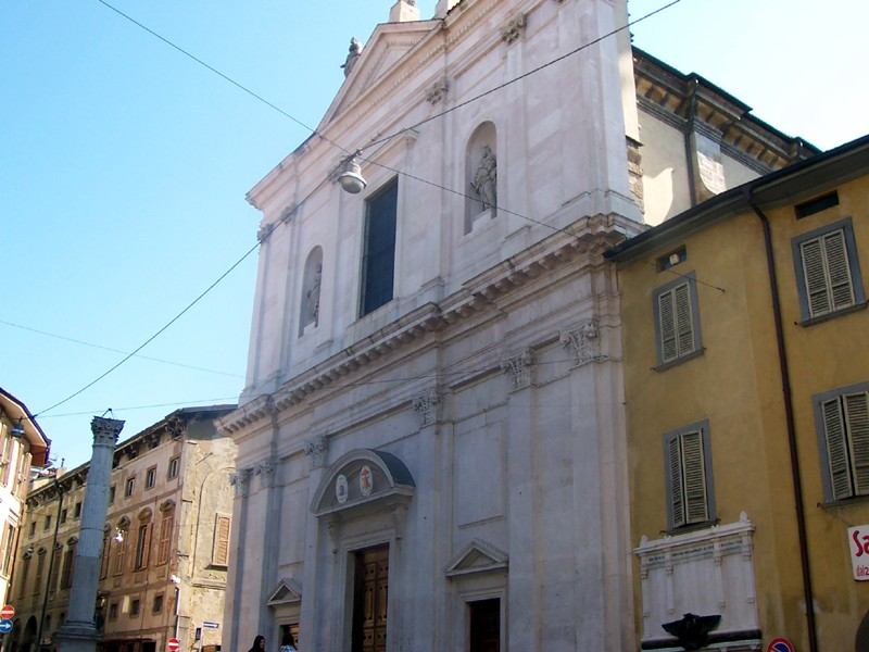 Bergamo - Chiesa di S. Alessandro in Colonna